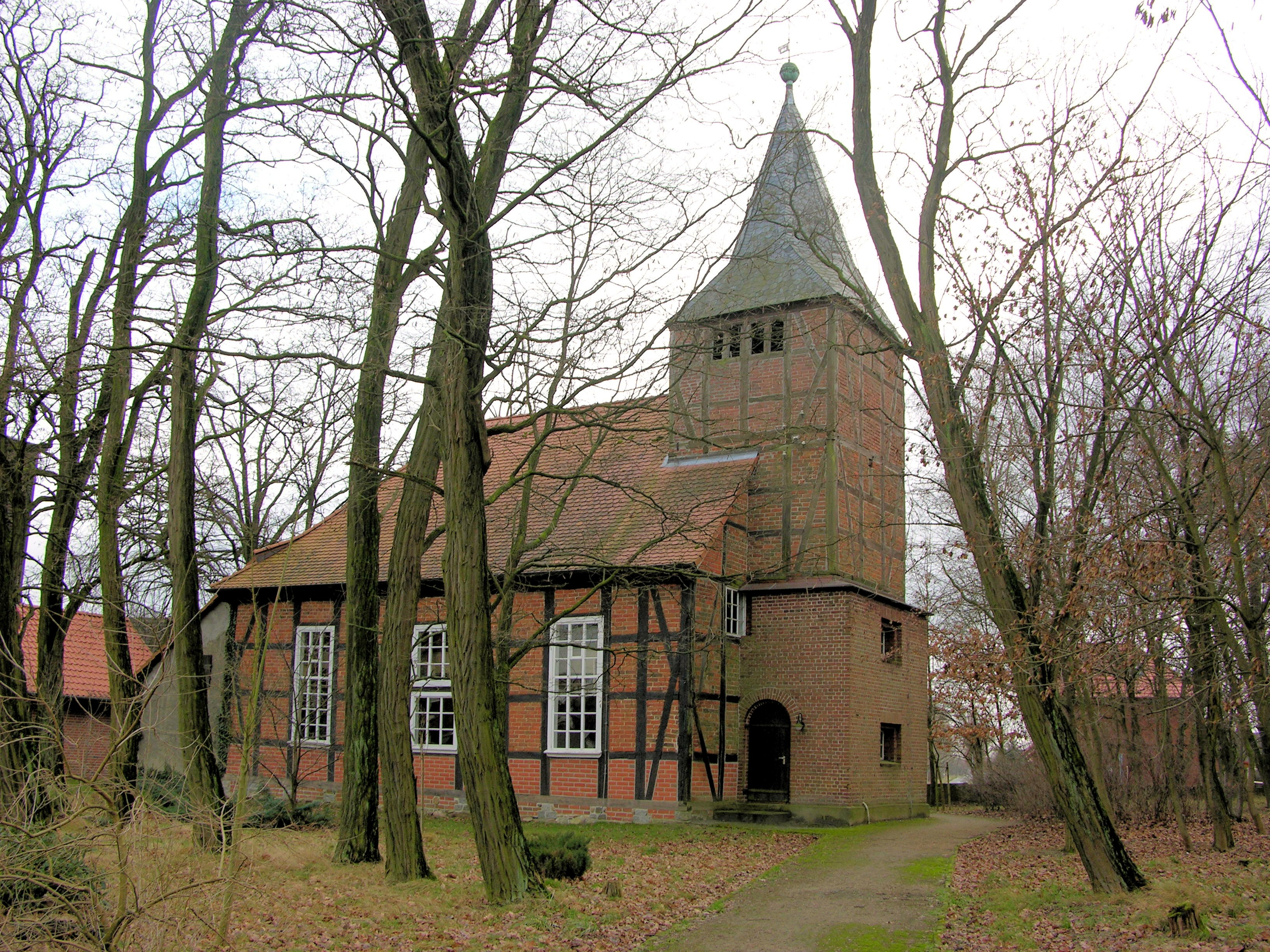 Kirche in Neuferchau (Altmark)